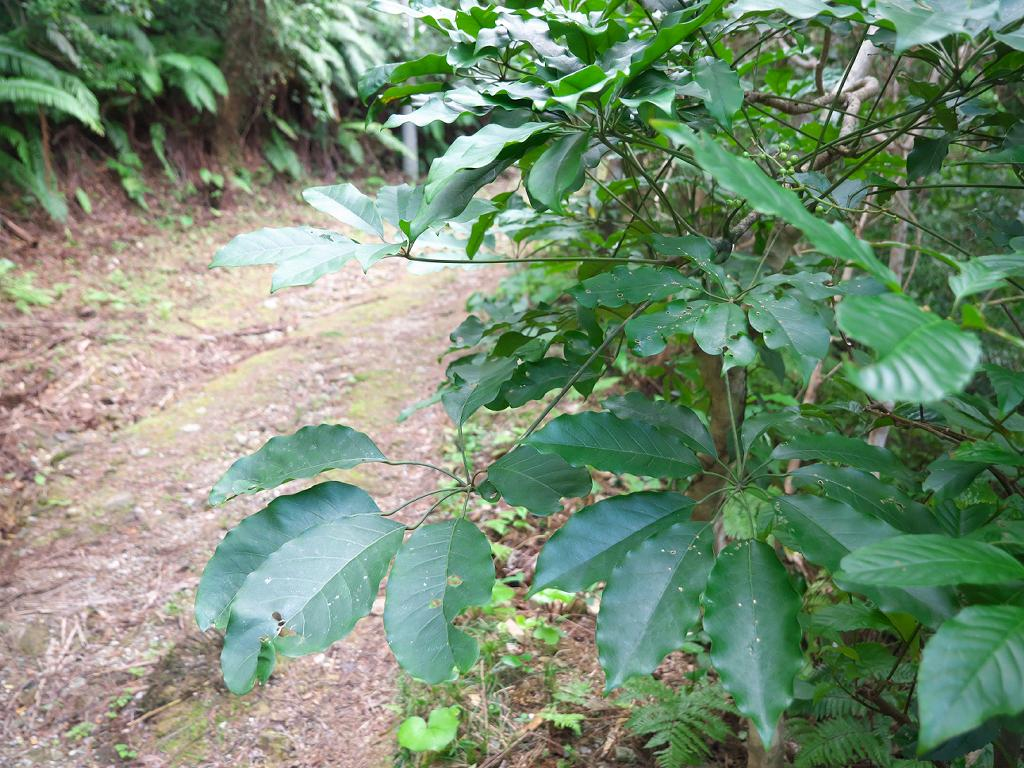 2020/01/02 沖縄本島：Okinawa Island, Japan